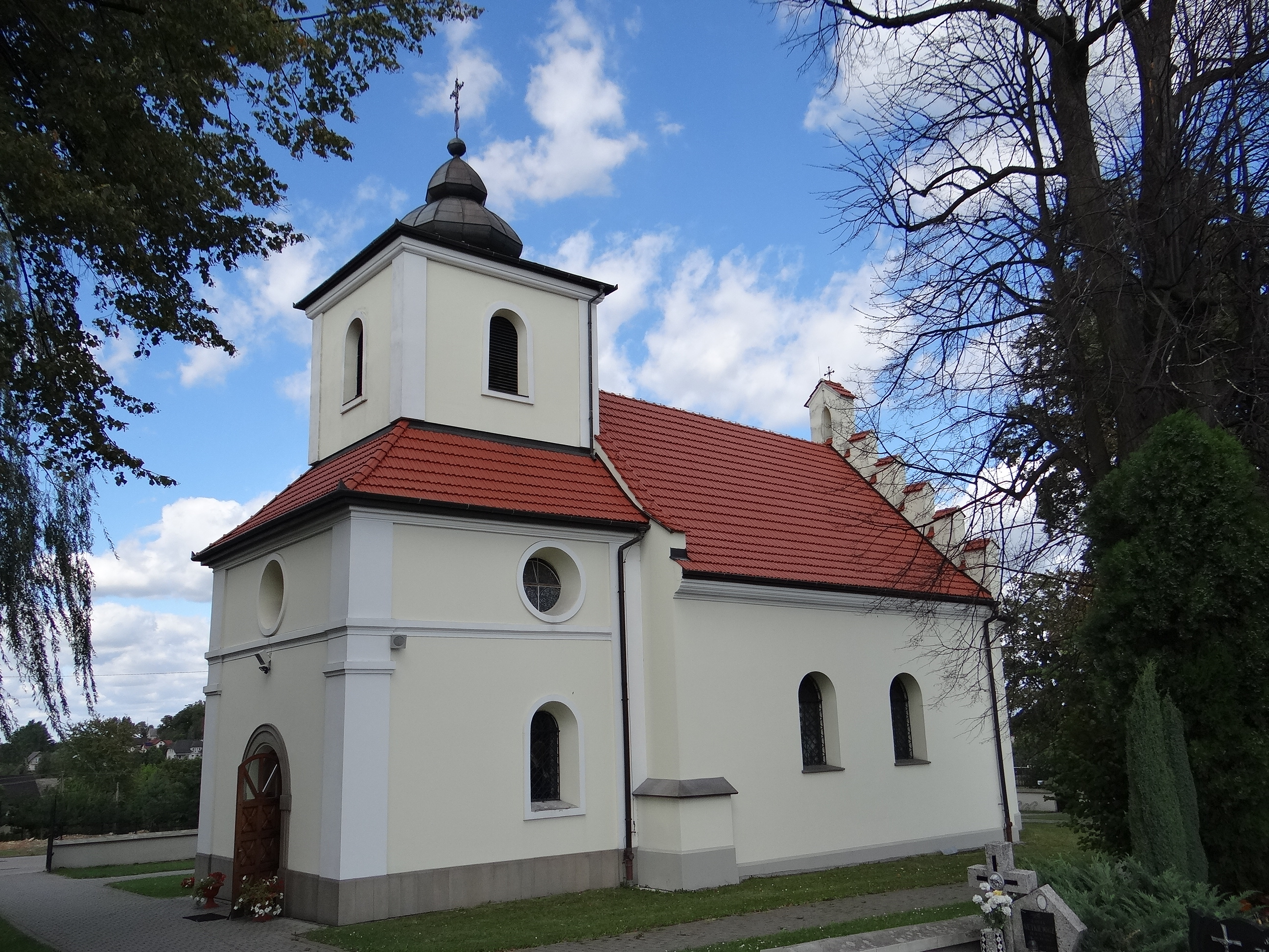 Sanka, kościół par. p.w. Jakuba Starszego, 1618-1624, 1783